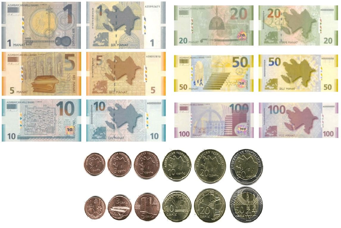 Азербайджанские манаты и копейки